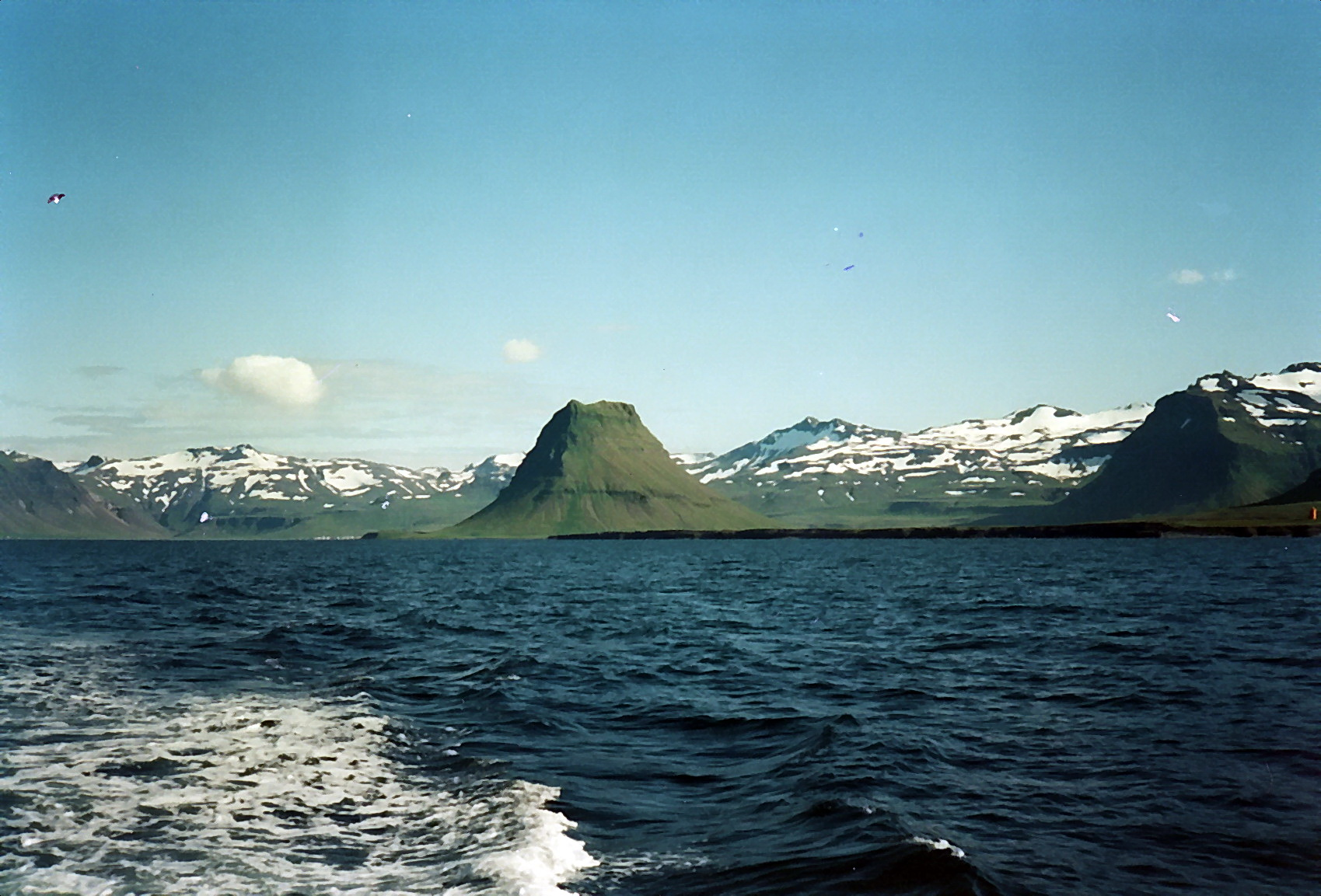 Grundarfjörður norðanmegin frá sjó.